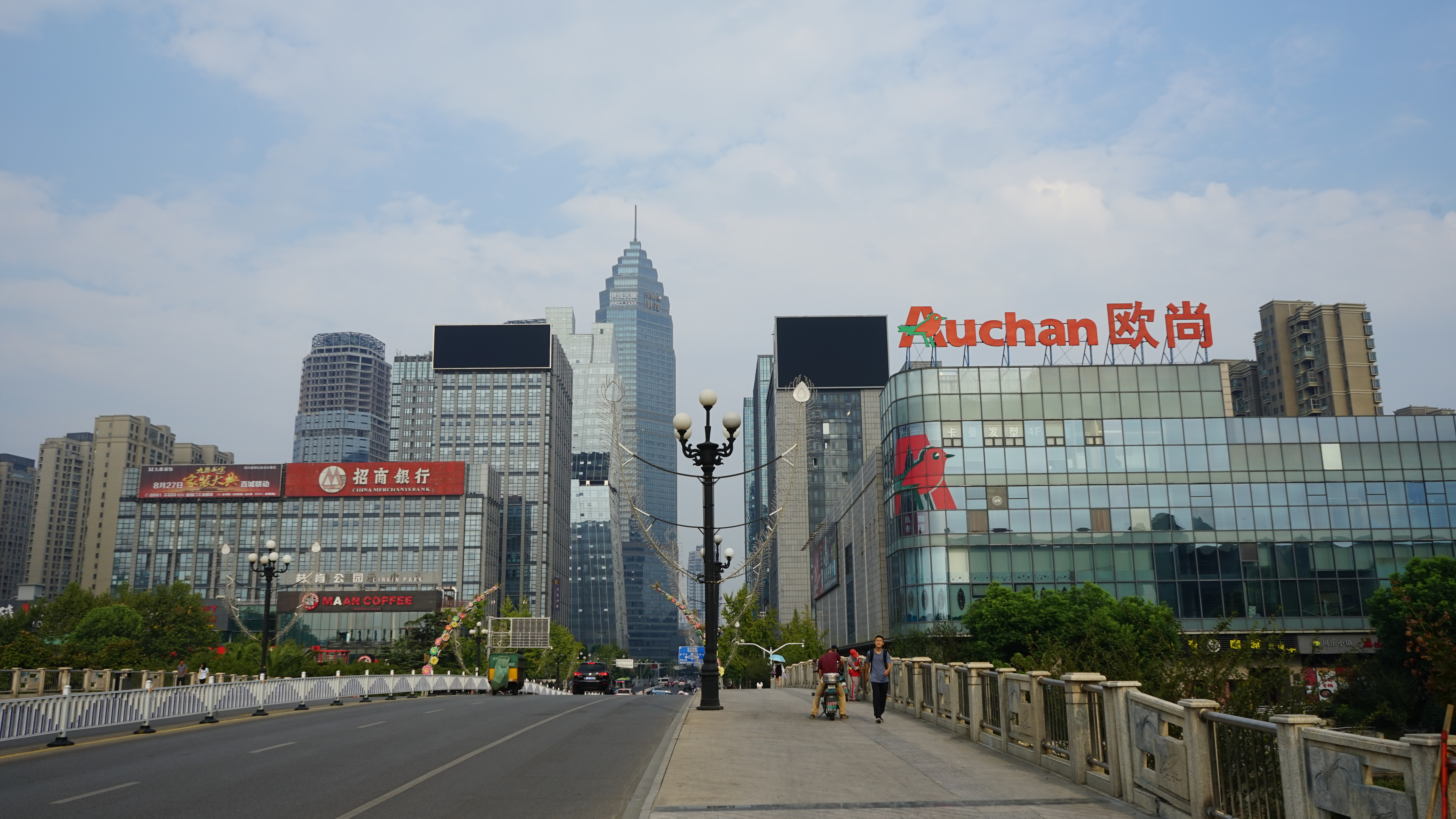 绍兴迪荡新城,胜利东路拍摄